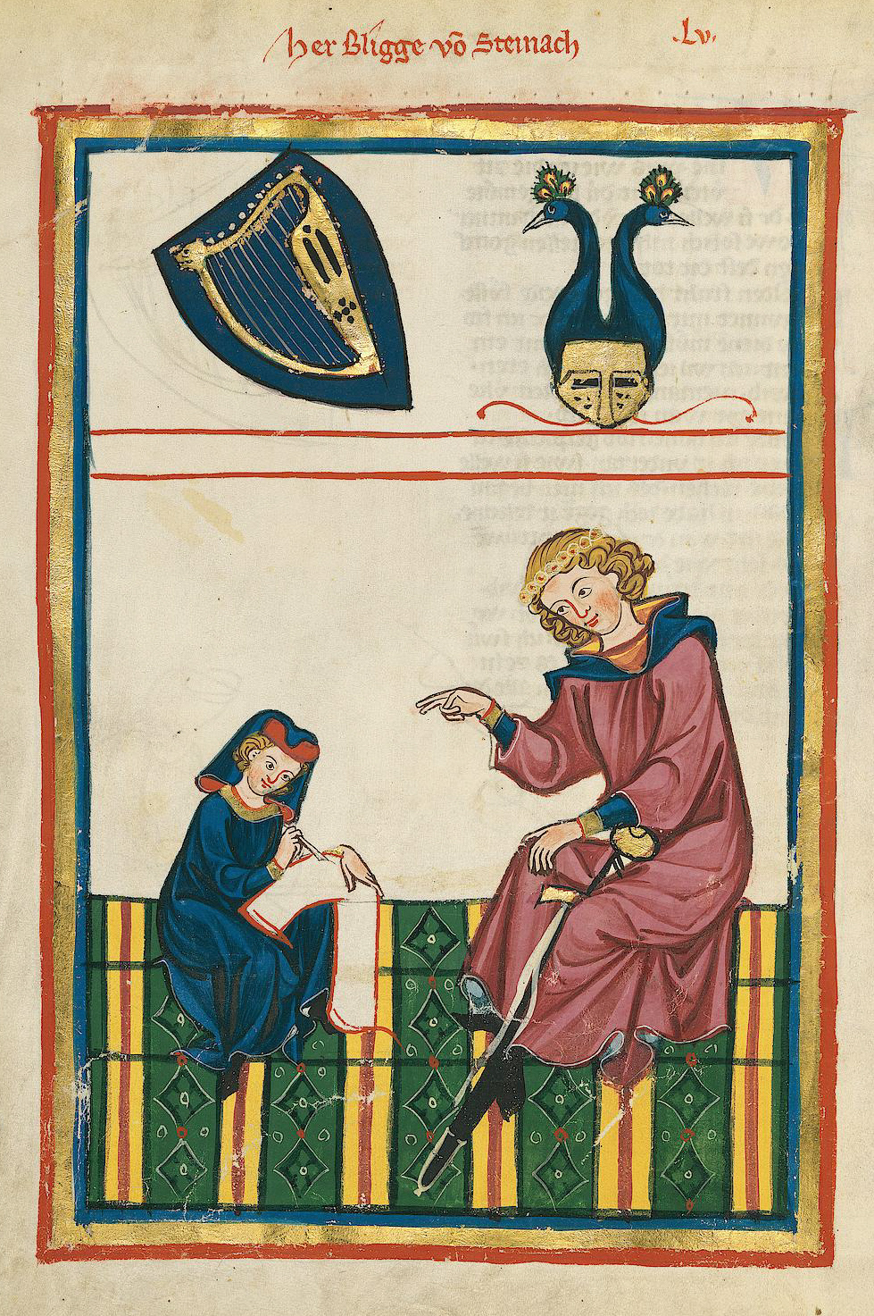 Codex Manesse, UB Heidelberg, Cod. Pal. germ. 848, fol. 182v, Herr Bligger von Steinach